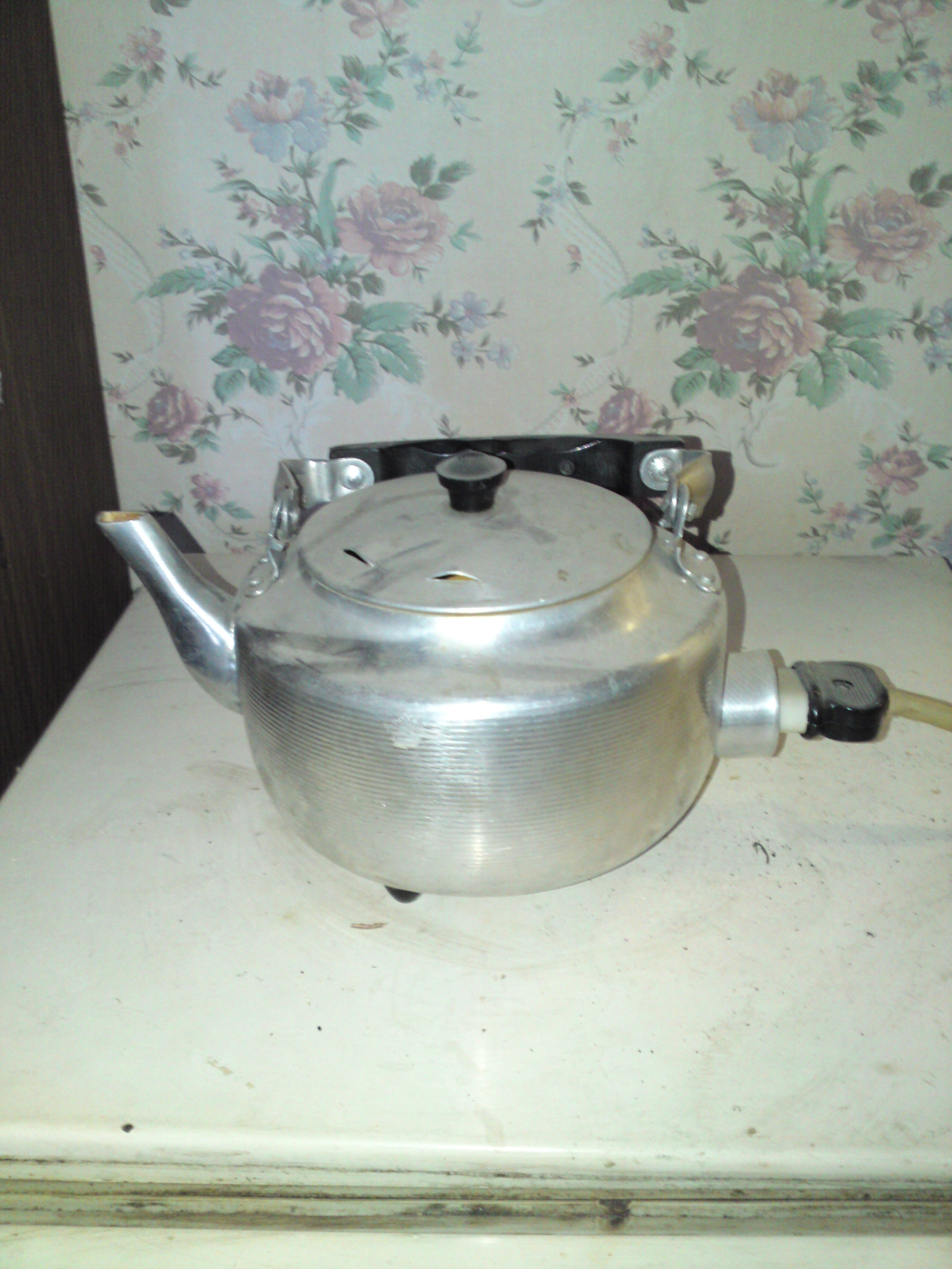 Типовой электрочайник со встроенным кипятильником.